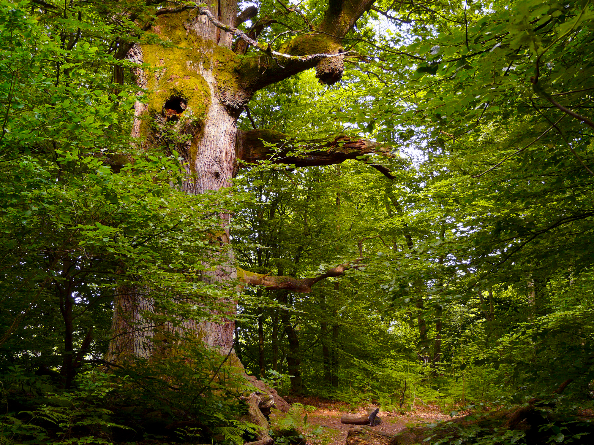 NSG 63302 Urwald Sababurg: Eichenveteran.